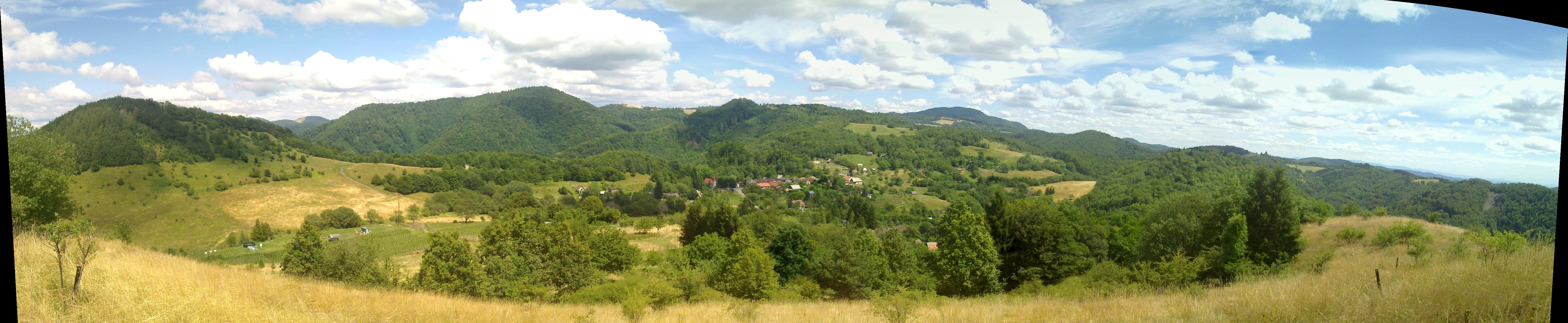 Štiavnické vrchy (fotené z vrchu Banište na severo-západ)